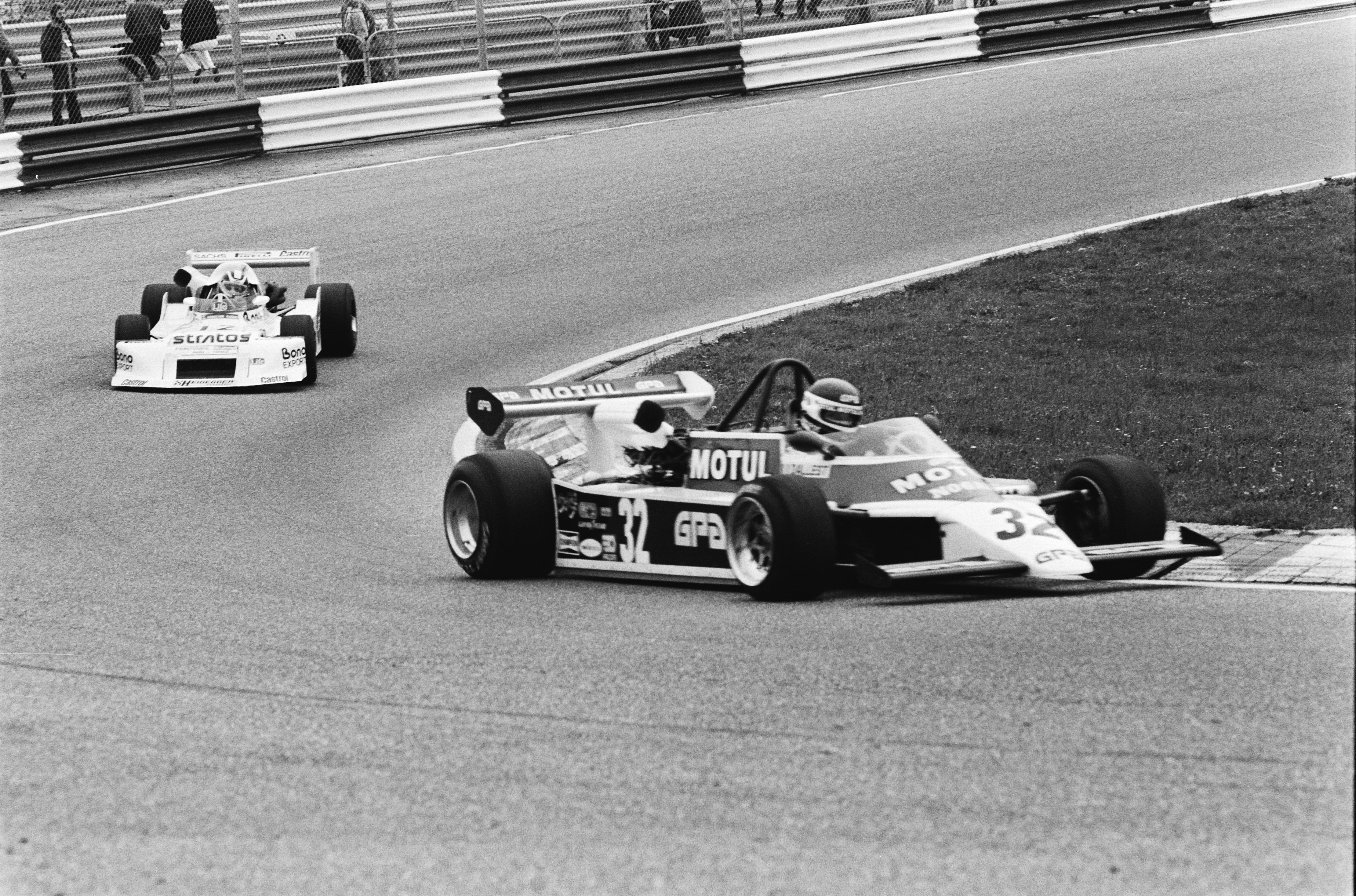 Collectie / Archief : Fotocollectie Anefo Reportage / Serie : EK Formule 2 1980 races op Zandvoort Beschrijving : Richard Dallest in aktie Datum : 20 juli 1980 Locatie : Noord-Holland, Zandvoort Trefwoorden : autoraces, raceauto"s, racebanen Persoonsnaam : Dalles, Richard Fotograaf : Pereira, Fernando / Anefo Auteursrechthebbende : Nationaal Archief Materiaalsoort : Negatief (zwart/wit) Nummer archiefinventaris : bekijk toegang 2.24.01.05 Bestanddeelnummer : 930-9338